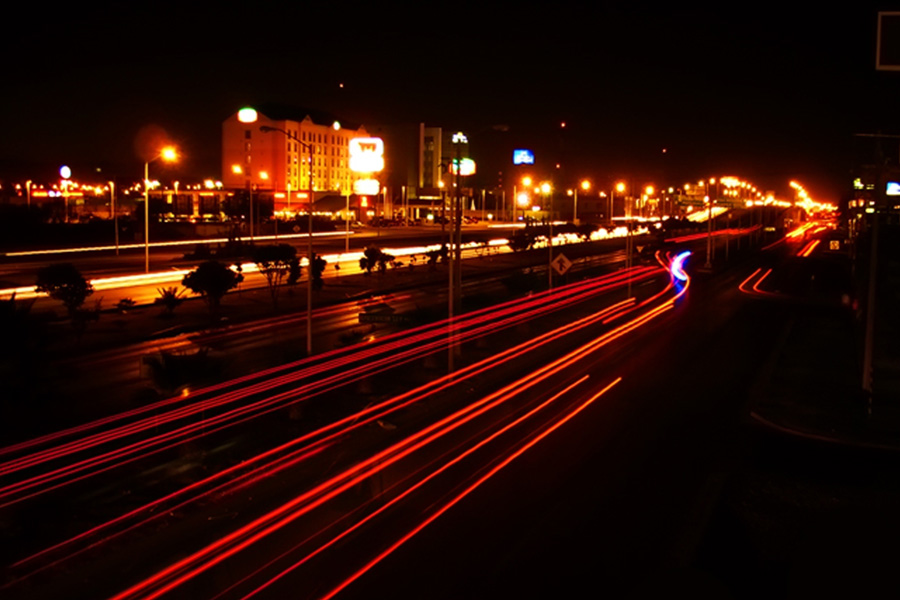 Carretera 57